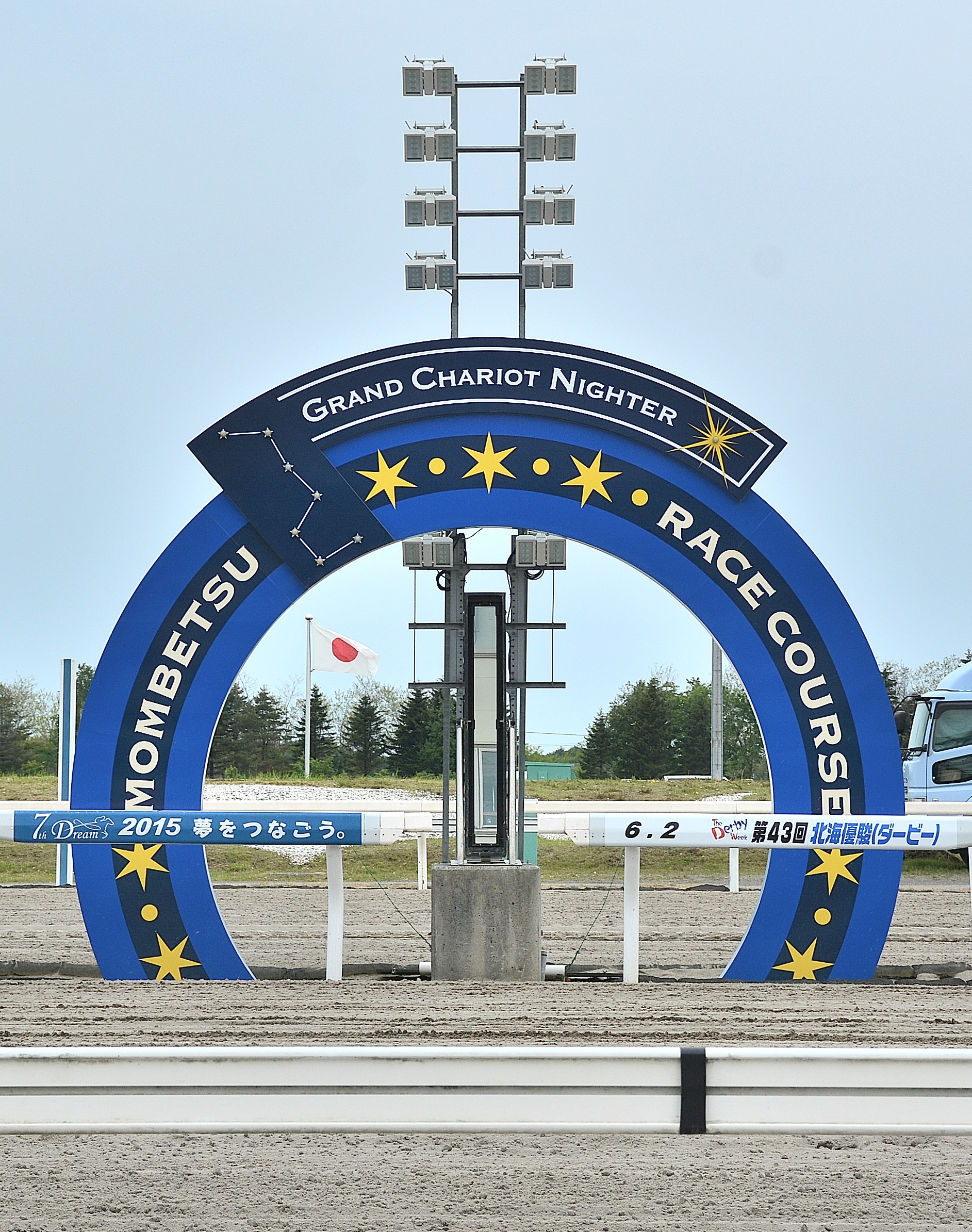 2015年6月2日に、門別競馬場のゴール板を観客席から撮影したもの。